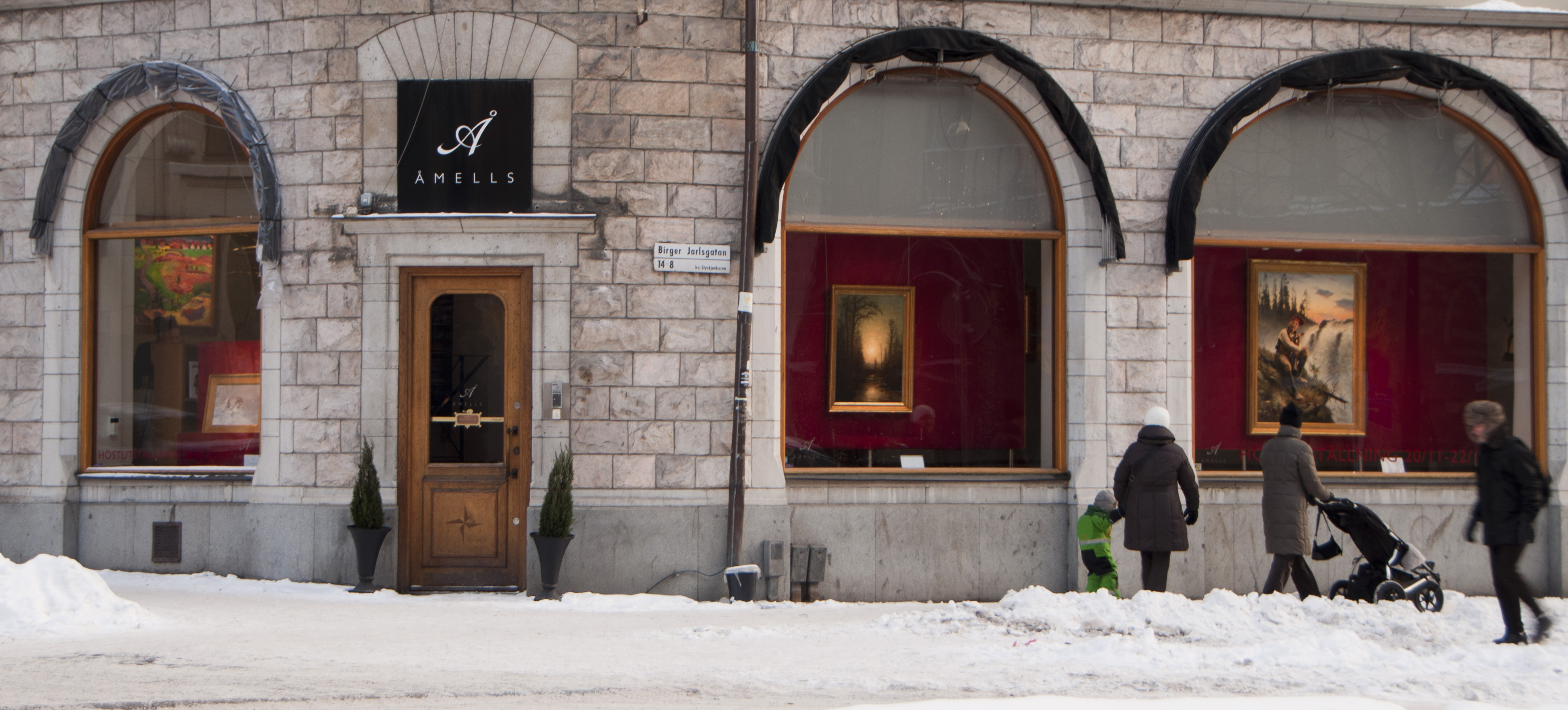 Åmells konsthandel, Birger Jarlsgatan 14, Stockholm.